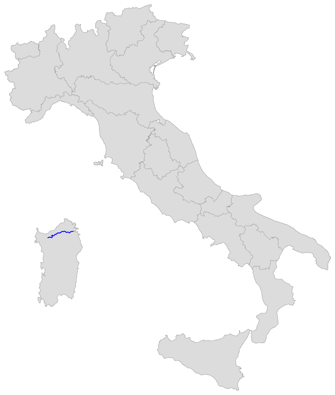 Percorso della SS 127 Settentrionale Sarda